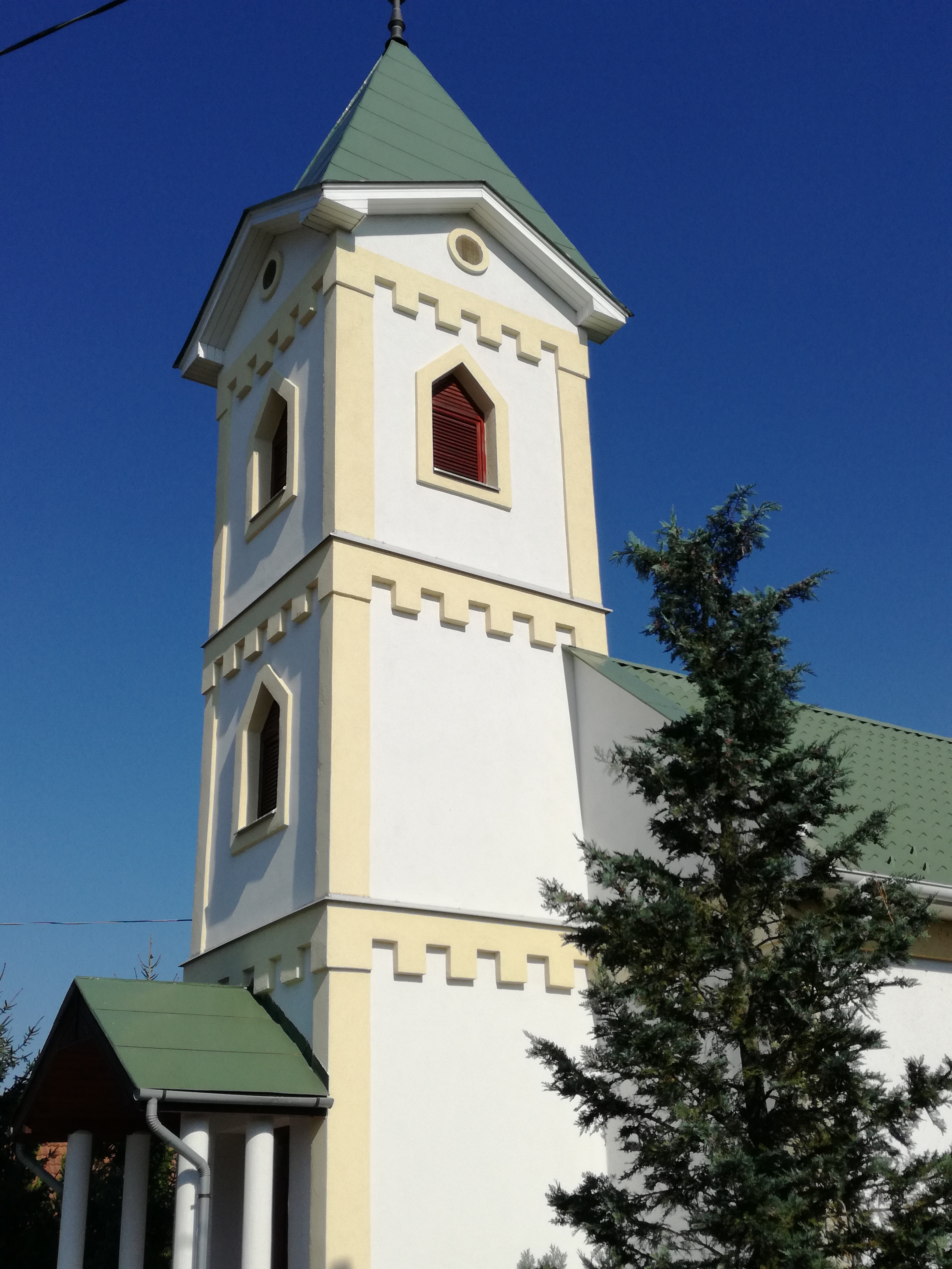 Reformierte Kirche in Jéke